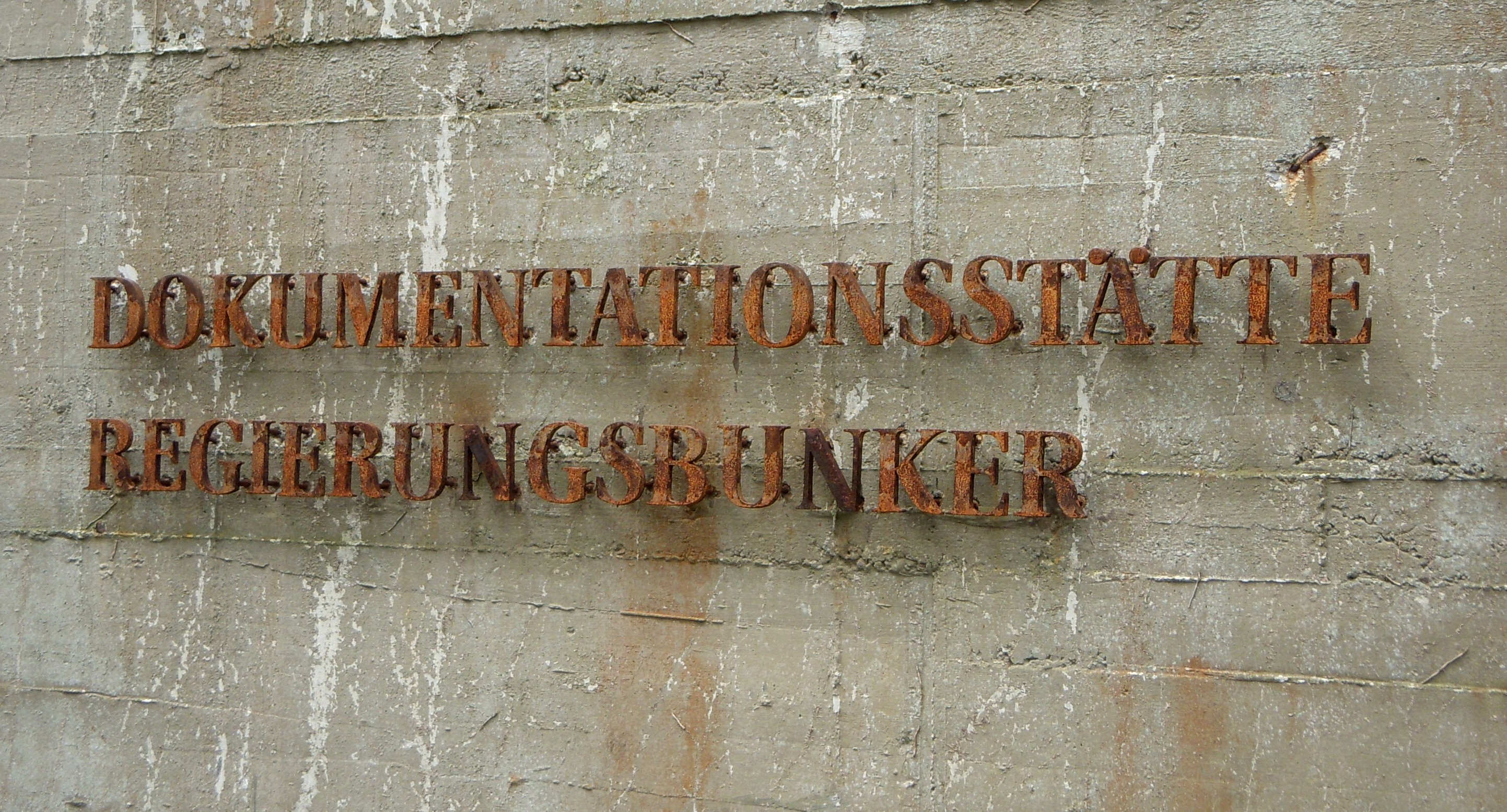 Der Regierungsbunker im Ahrtal, Eingangsschild